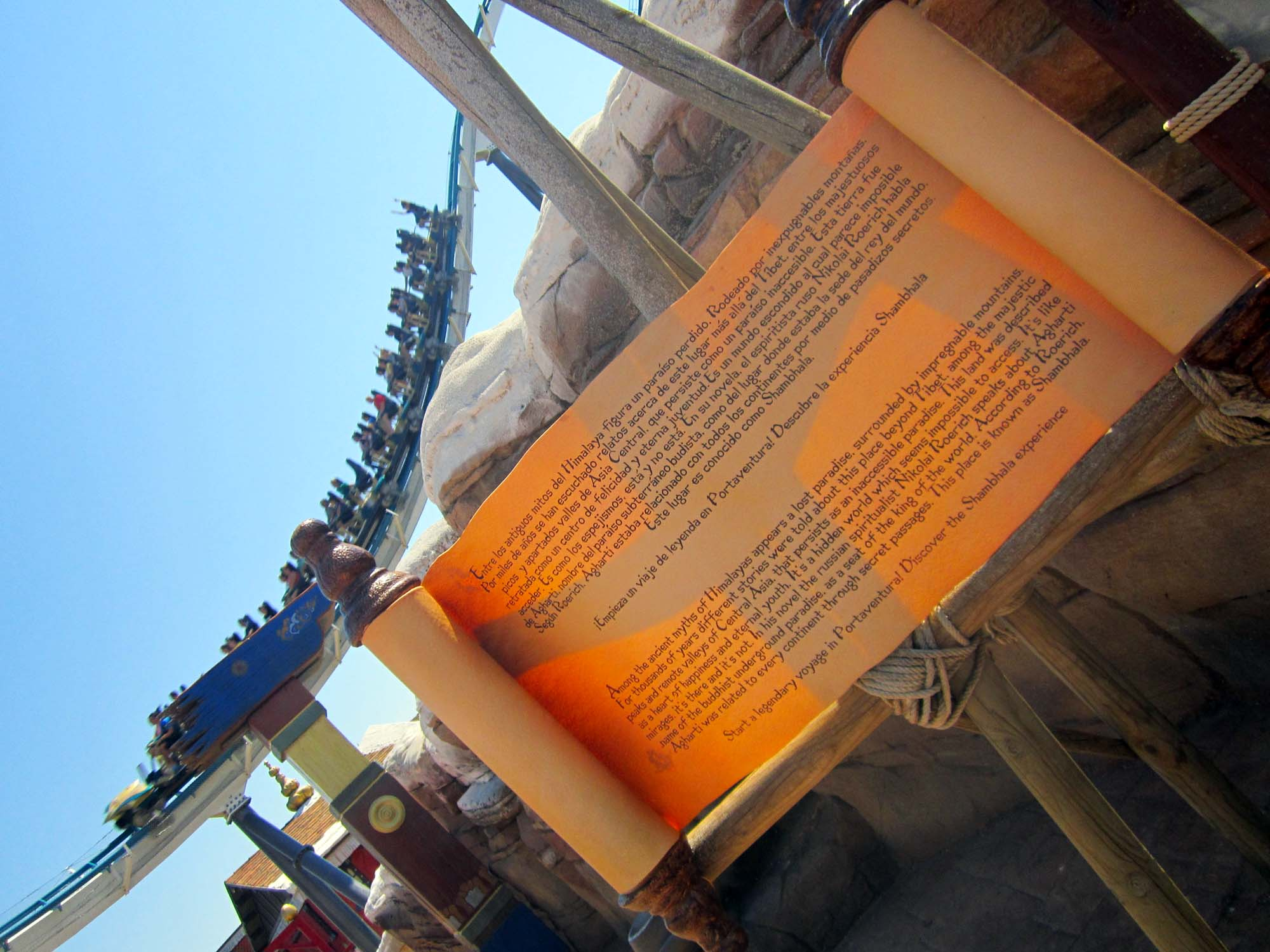 Pergamí on s'explica la llegenda del regne Shambala. El podem trobar al passar per el pòrtic de l'entrada a l'àrea de Shambala.